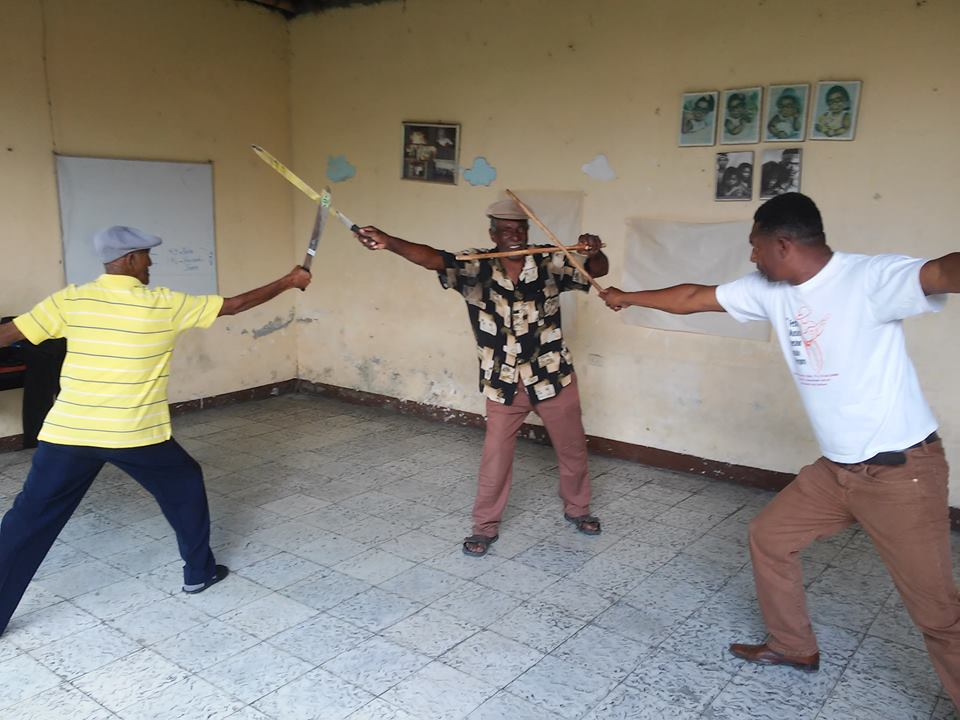 Maestros de la Academia de Esgrima de machete Puerto Tejada. Arte marcial colombiano utilizado por los negros en las batallas civiles. Es una modificación de la esgrima española, adaptada al machete o peinilla. Esta fotografía fue tomada en el municipio colombiano con código 19573.